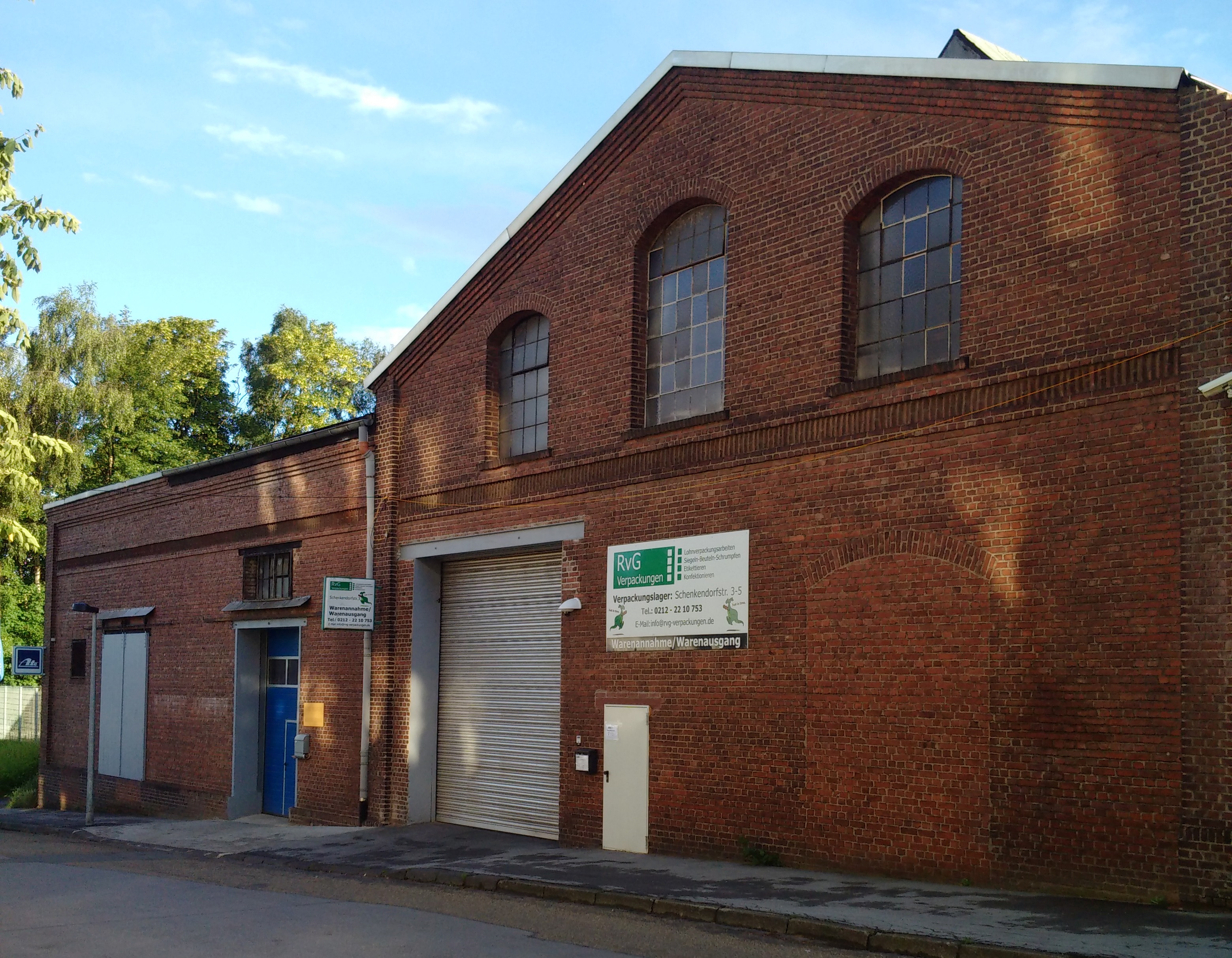 Industriegebiet Solingen-Wald, Schenkendorfstraße, aufgenommen im Sommer 2016